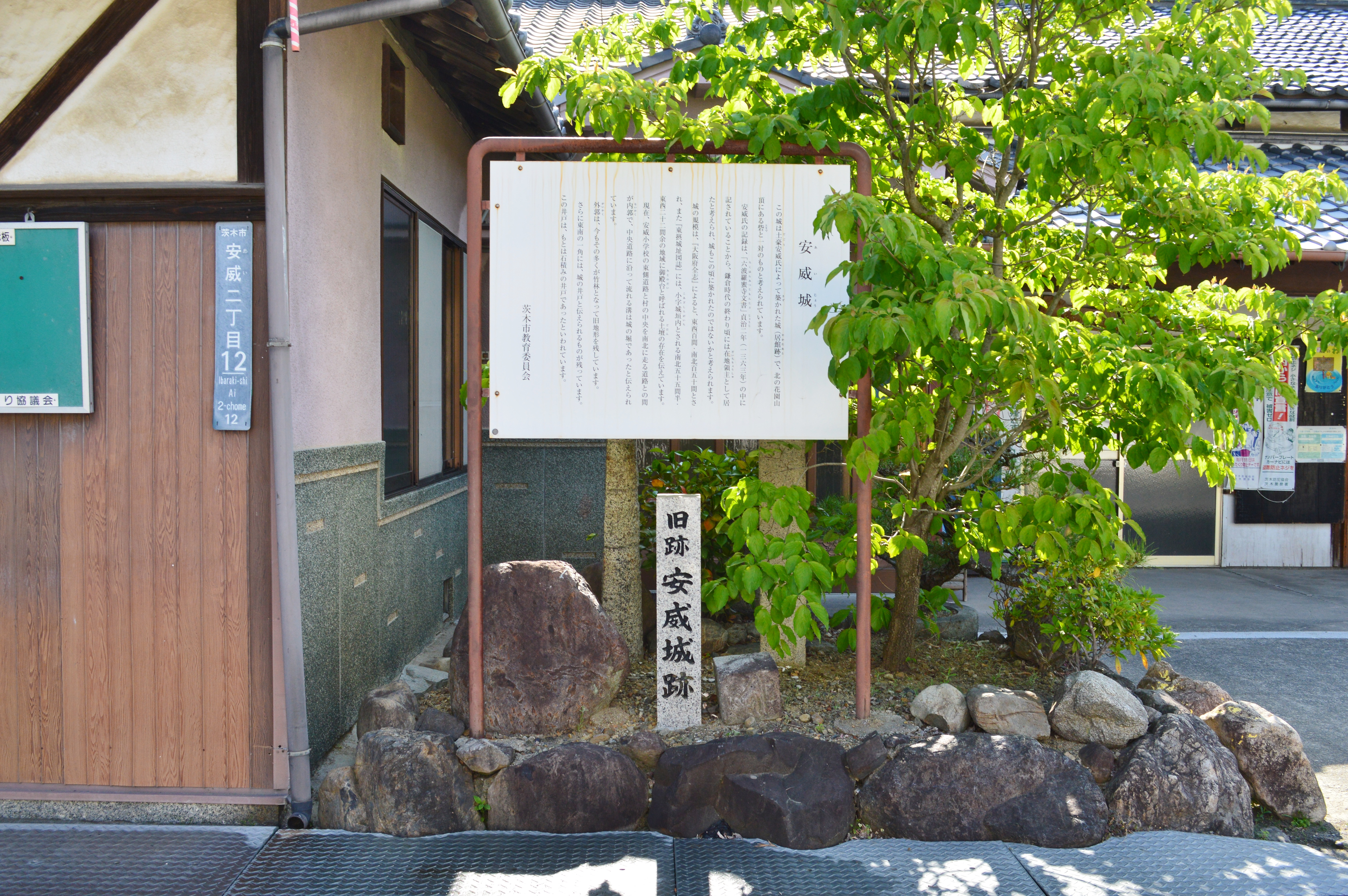 安威城 石碑・説明板 Nikon D3200